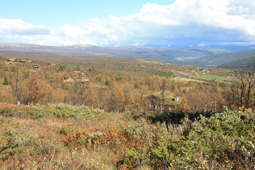 Skåbu